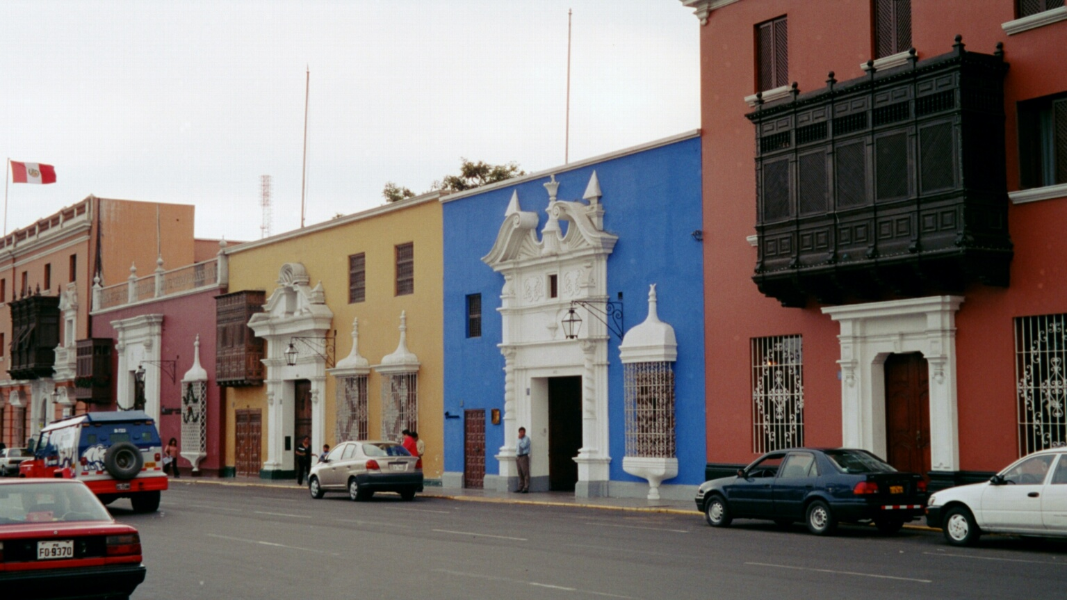 Straße mit "Casa Calonge" oder "Casa Urquiaga" (blau) und "Casa Bracamonte" (gelb) aus dem 18. und 19. Jahrhundert